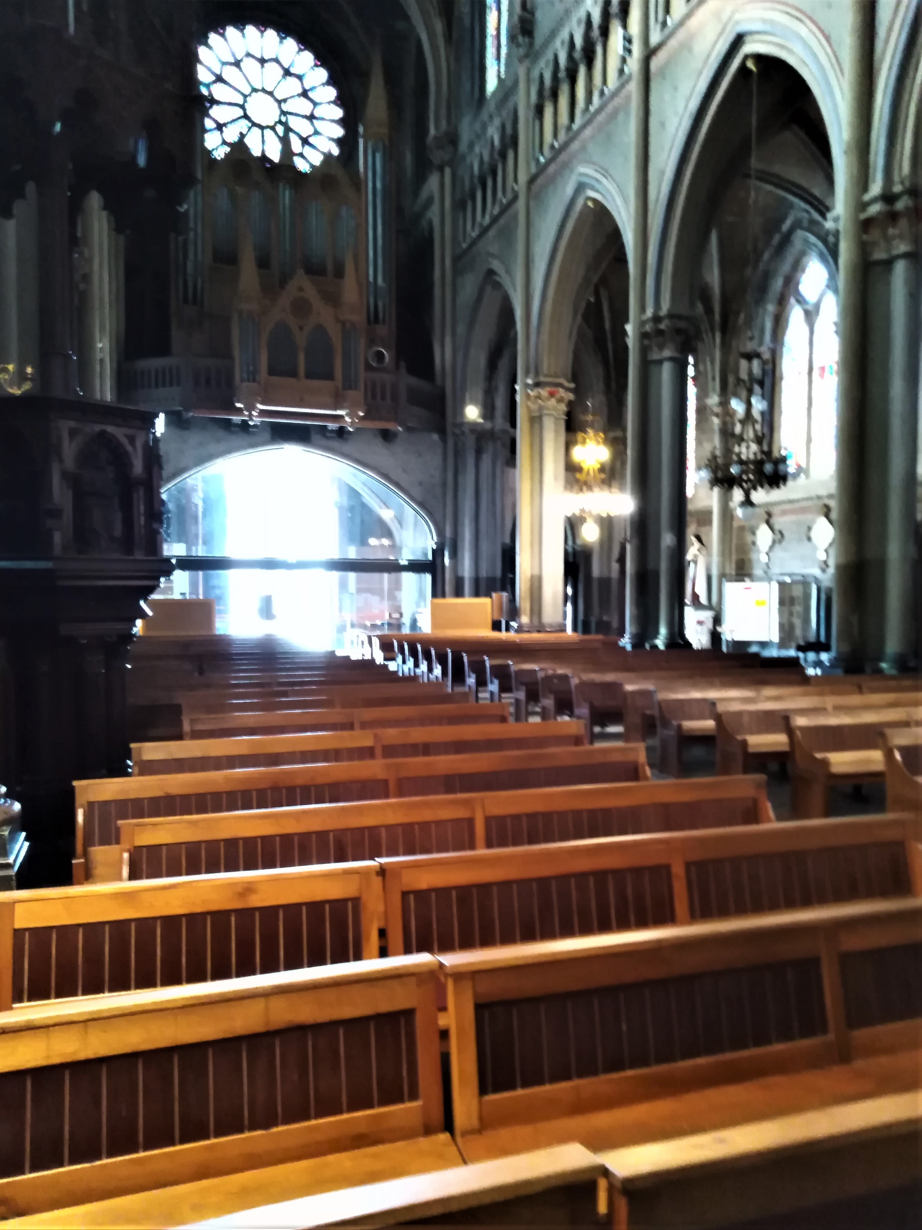 Intérieur de l'église de Voiron